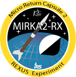 Missions Logo MIRKA2-RX